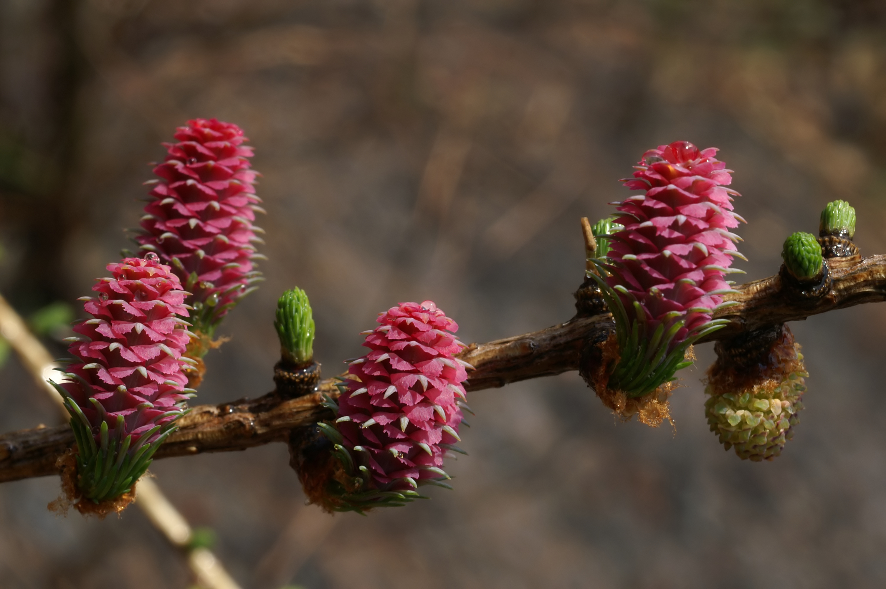 Europäische Lärche (Larix decidua), waagrechter Zweig mit 4 weiblichen und einer männlichen Blüte, Bergehalde in Ensdorf, Saarland, Deutschland.